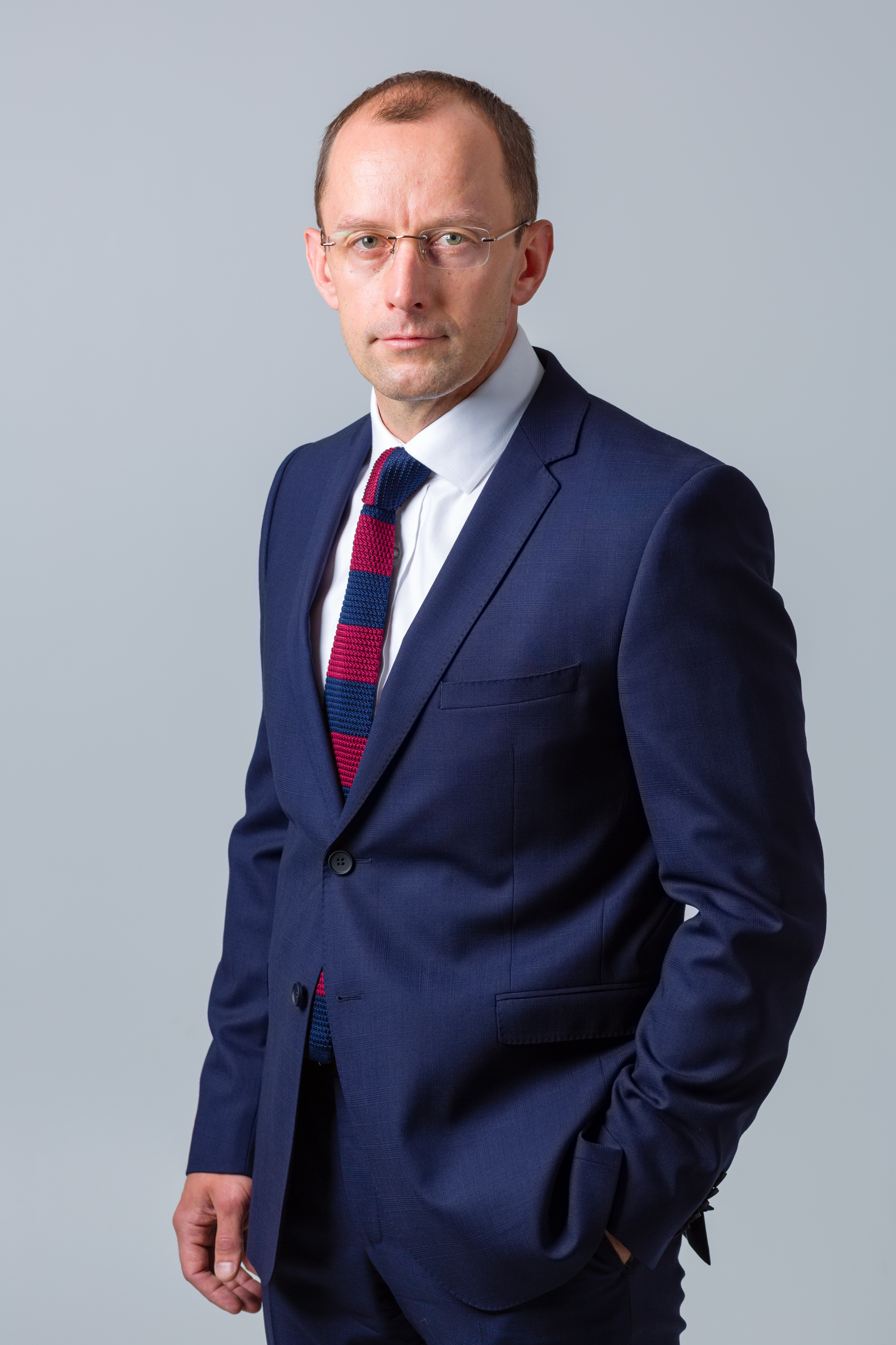 Ivo Raudjärv aastal 2017